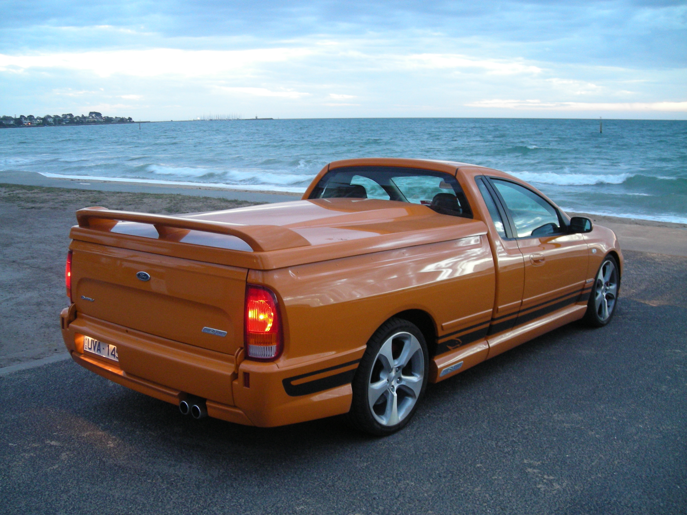 Australian FPV BF Super Pursuit utility